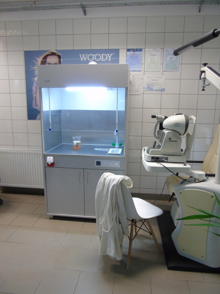 Typowe dygestorium szkolne marki syLABa.